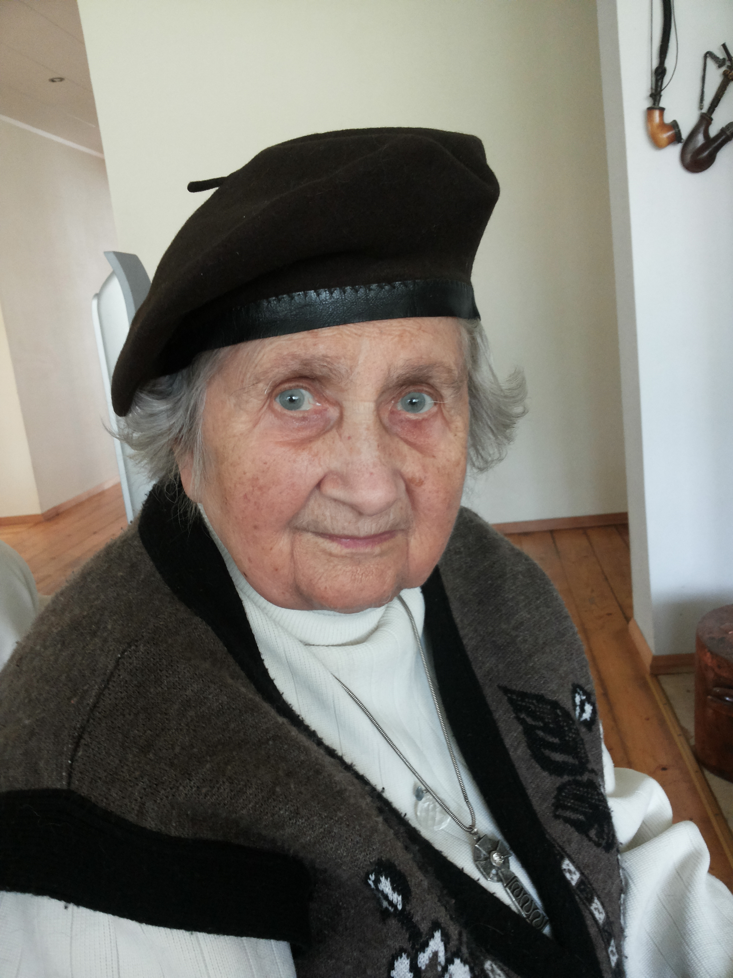 Ellen Tamm